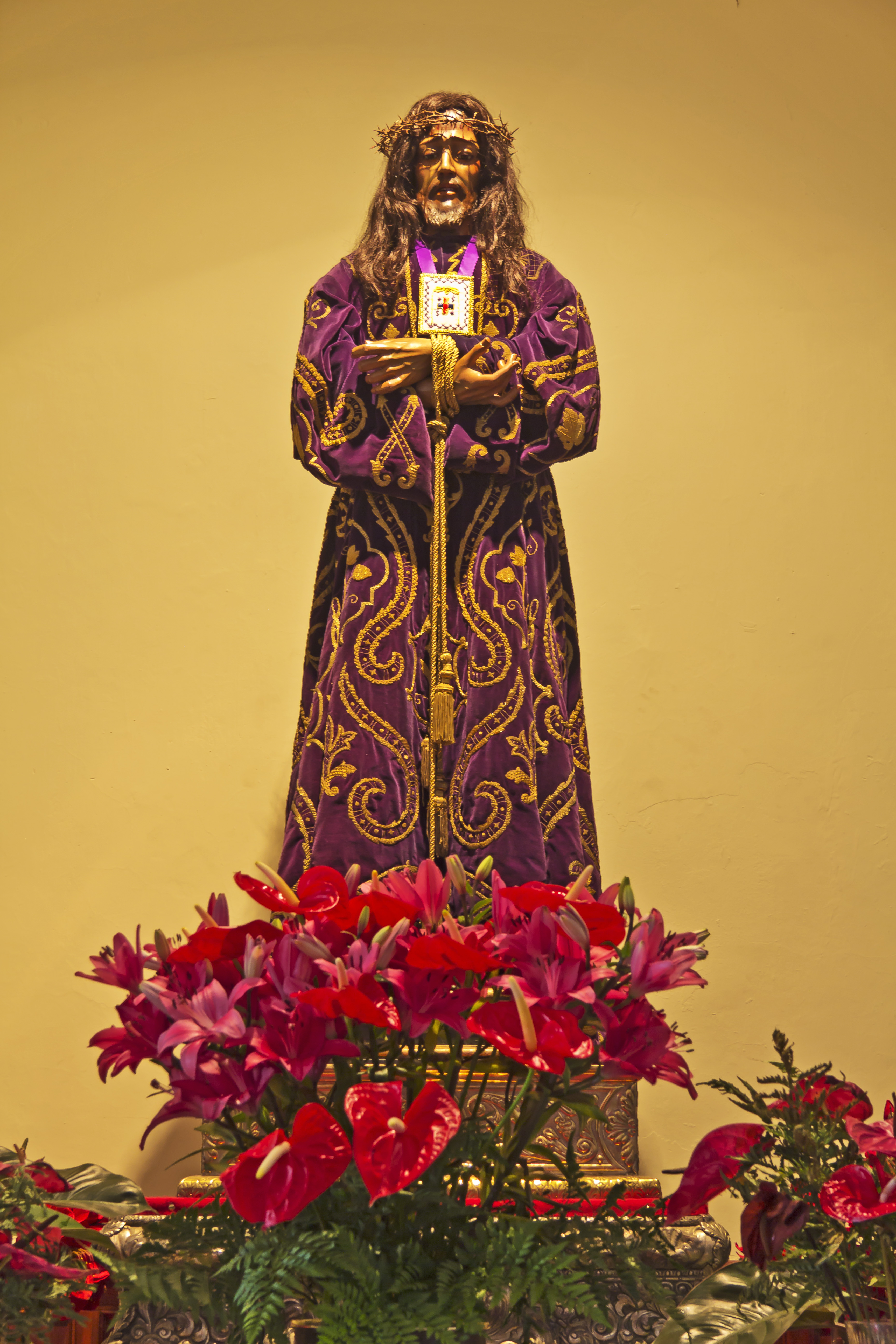 Christusfigur in der Kirche San José in Santa Cruz de Tenerife